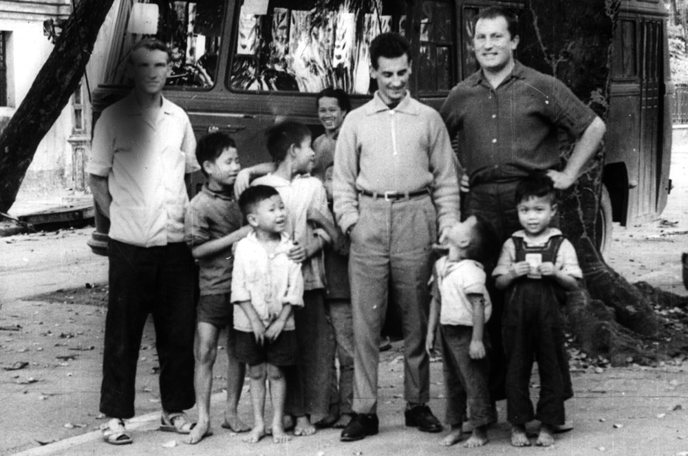 Ю.Георгиевский, В.Фёдоров и хайфонские дети Фотоальбом Виктора Николаевича Болярского. ДРВ, 1966-1967.